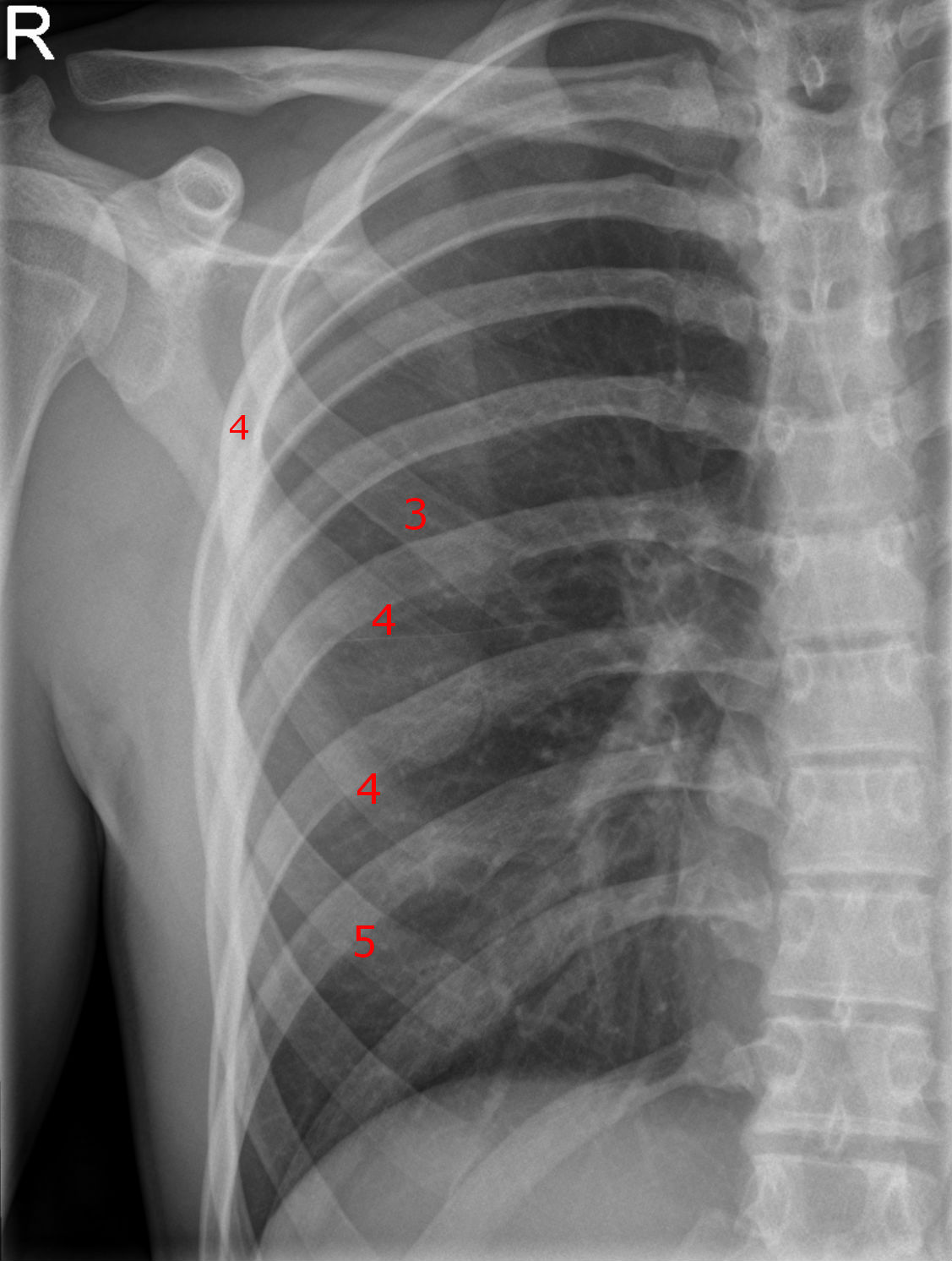 Gabelrippe im Röntgenbild C4 (C = Costa = Rippe). Nummerierung der vorderen und lateralen Rippenteile